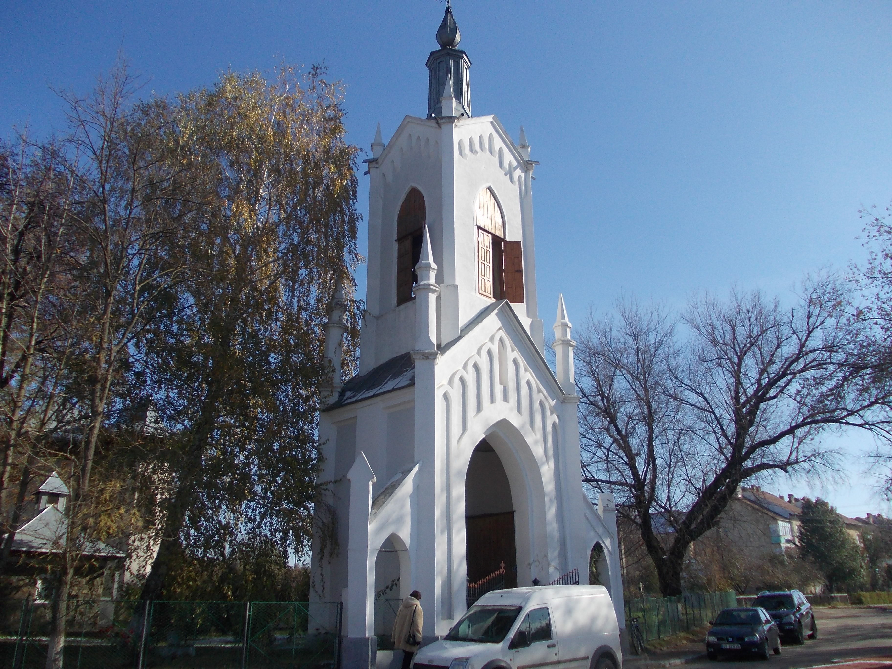 Clopotniţă biserică Sf, Nicolae Săveni,Botoşani